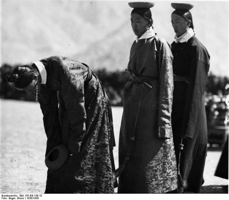 Lhasa, eine tibetische militärische Meldung der Kaschag bei der Kavallerie-Parade